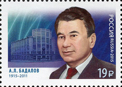 100 лет со дня рождения А.Л. Бадалова (1915–2011), заслуженного связиста Российской Федерации